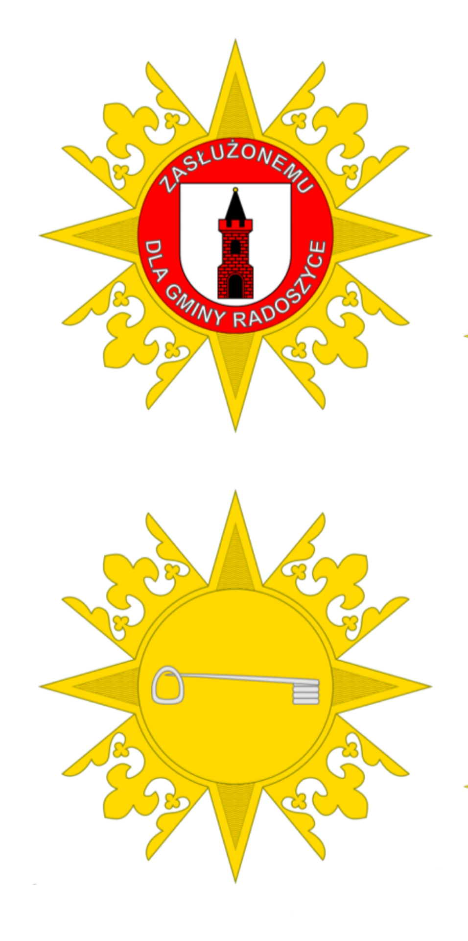 Odznaka Honorowa za Zasługi dla Gminy Radoszyce